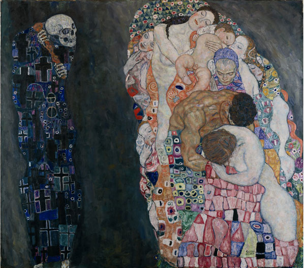 Tod und Leben